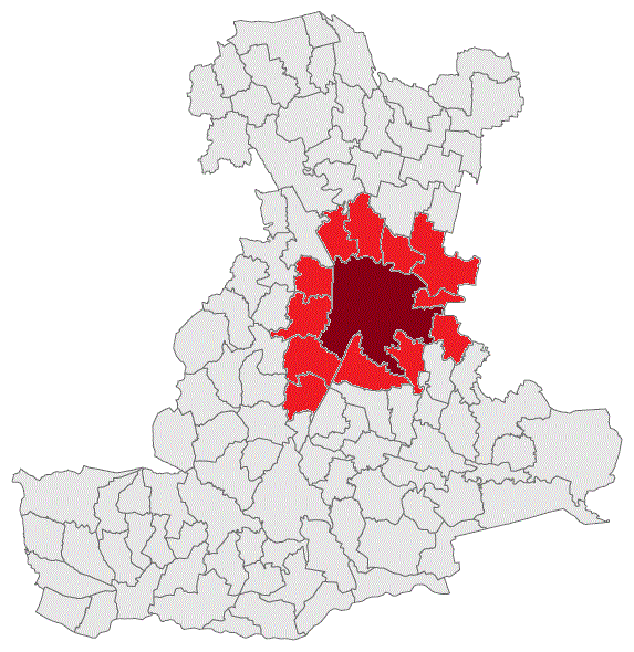 Mappa comuni dell'area metropolitana di Padova.